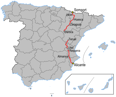 Mapa de la carretera N330